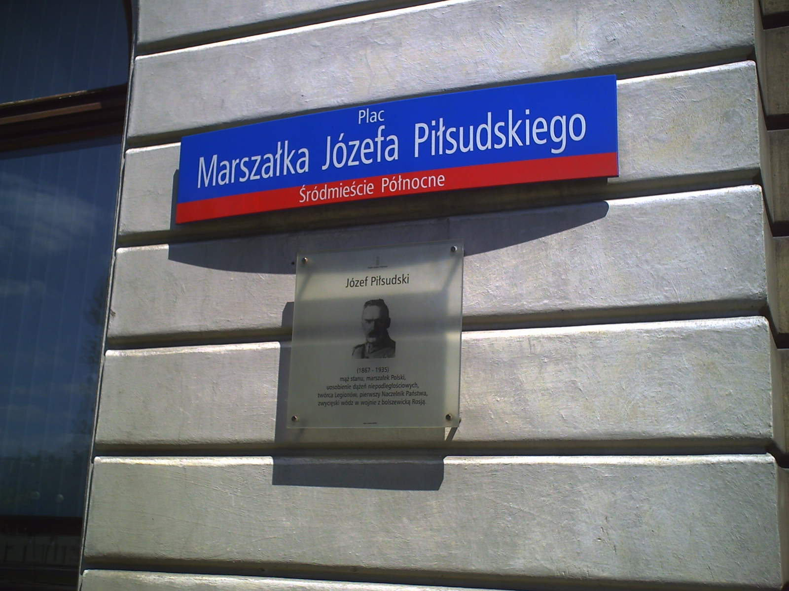 Plac Piłsudskiego, Warsaw, Poland.